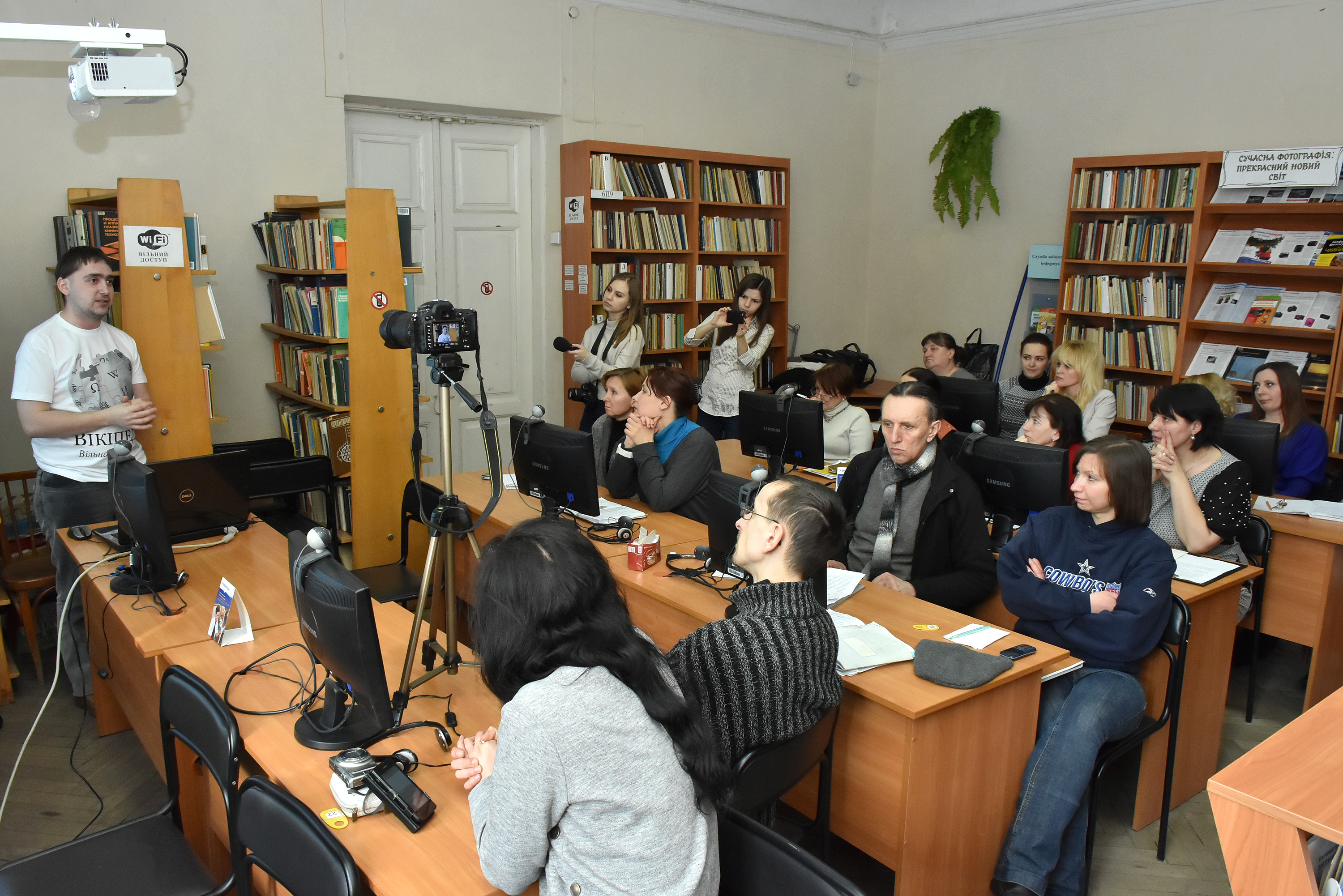 Вікізустріч з українським вікіпедистом, журналістом Мар'яном Довгаником у Тернопільській обласній універсальній науковій бібліотеці.